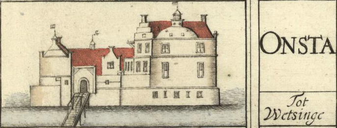 Borg Onsta te Sauwerd